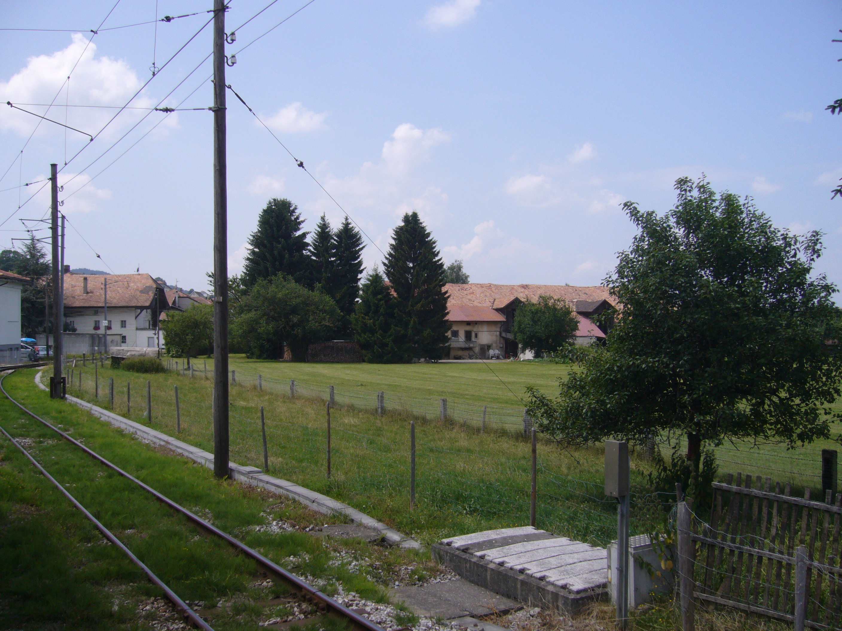 Blick weſtwärts aus dem Zuge auf der Station Wüadingen-Süd.